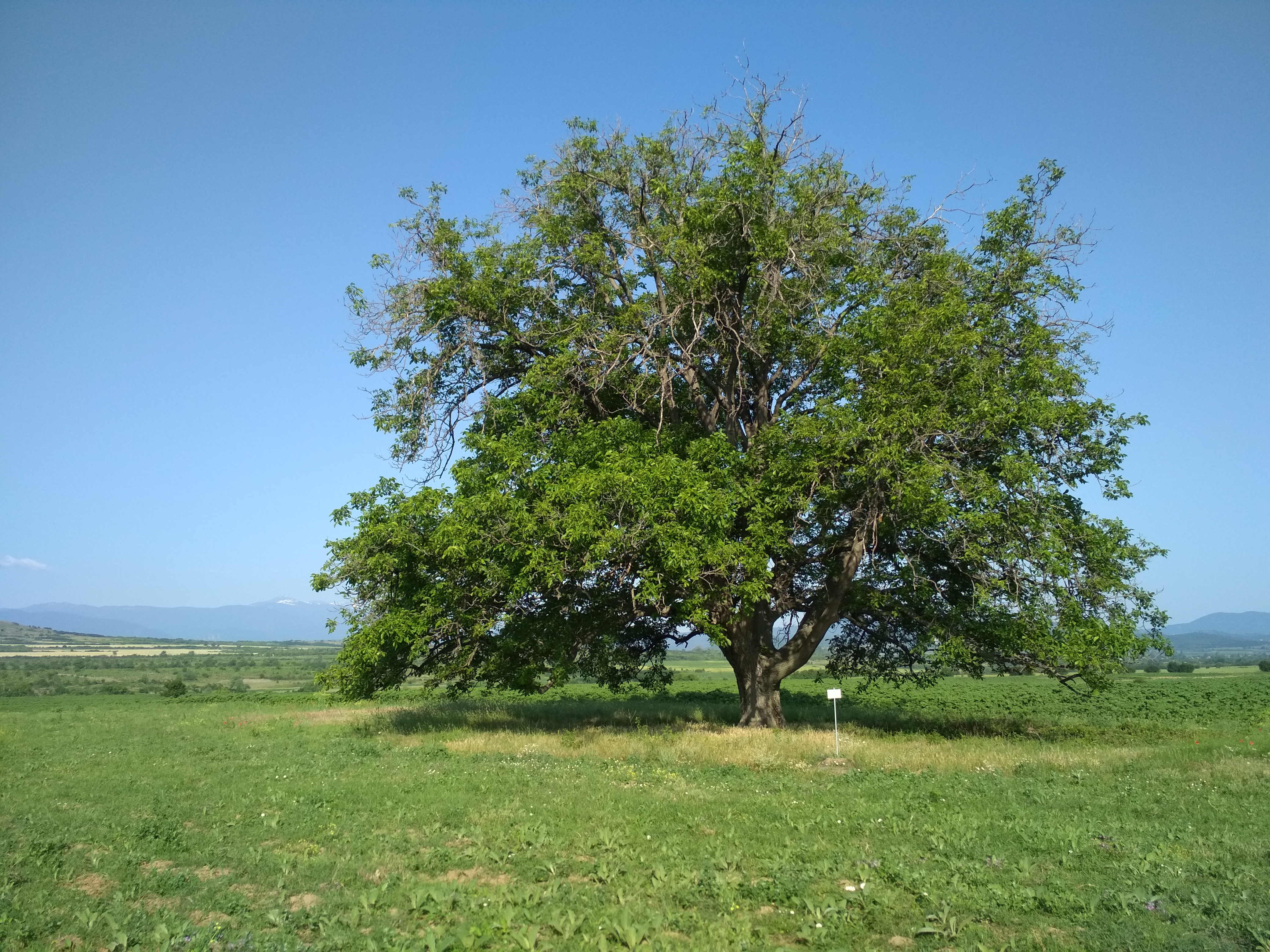 Обикновен орех (Juglans regia) с. Карабунар.